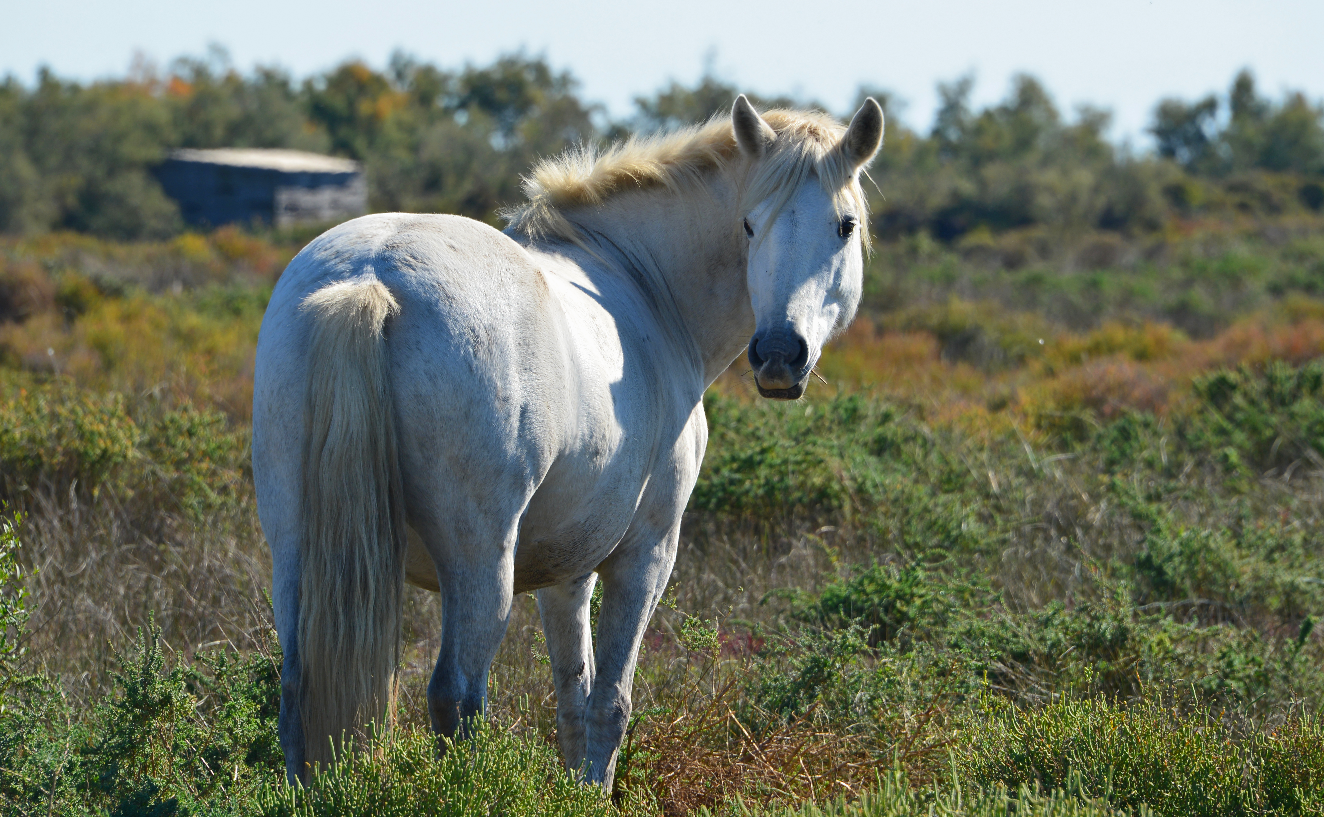 Cheval de Camargue